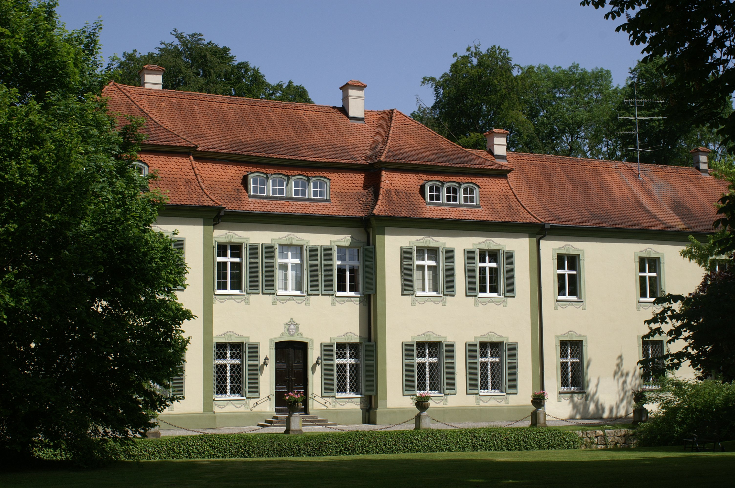 Das Neue Schloss der Freiherren von Freyberg in Allmendingen wurde 1782 erbaut. Das Gebäude und der Schlosspark liegen direkt an der Schmiech.